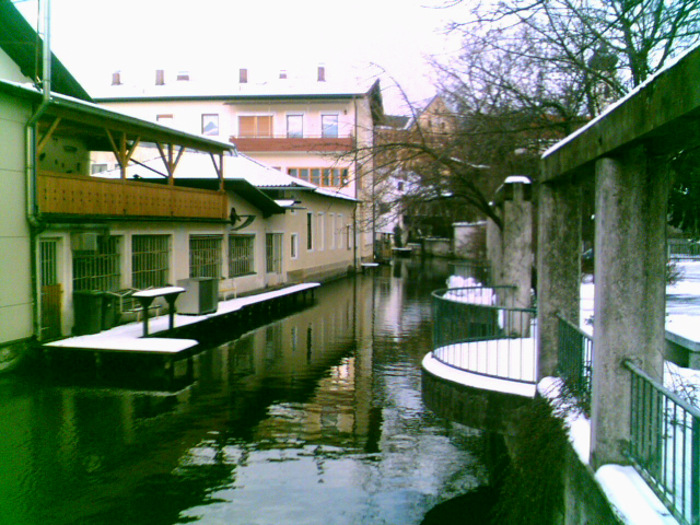 Bad Aibling: Klein Venedig (XII-2005)